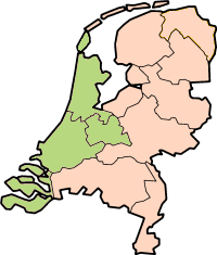 Locatiekaart van NUTS3: West-Nederland.